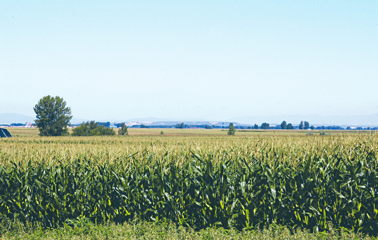 Camps de blat de moro a la comarca d'El Páramo (Lleó), 15 d'agost de 2004.